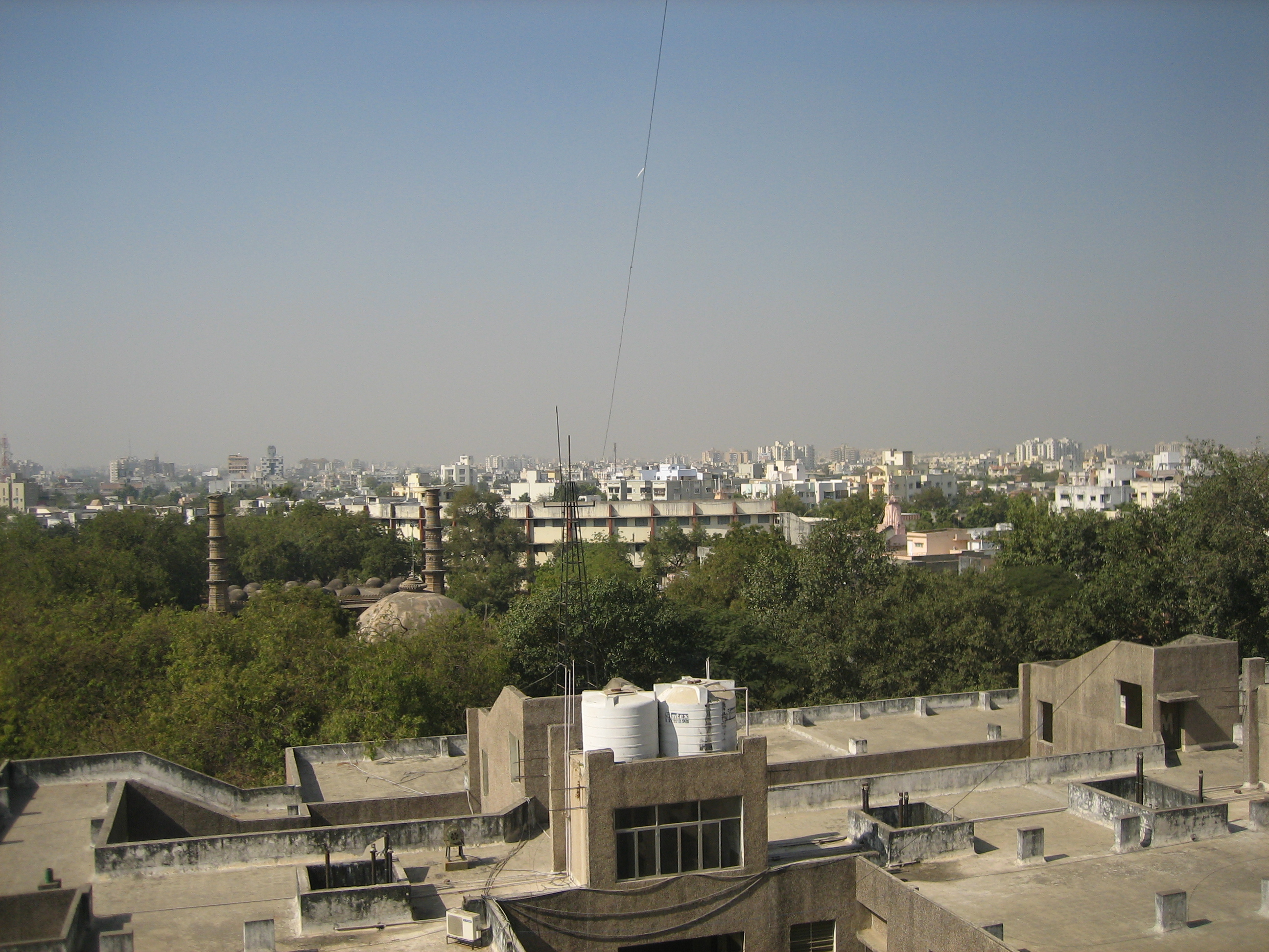 Ahmedabad 2007